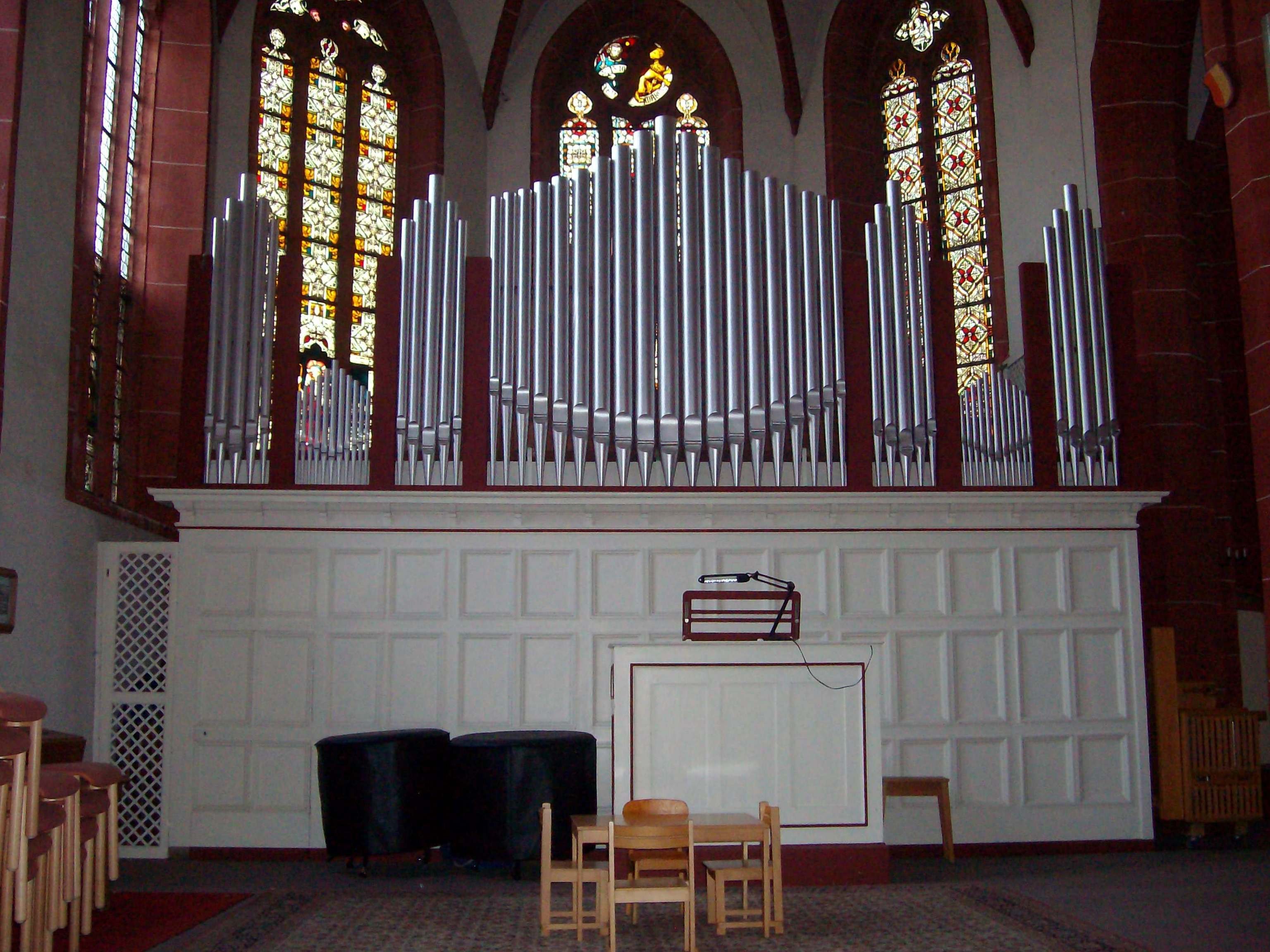 Orgel von Förster & Nicolaus in der Markuskirche in Butzbach, Hessen